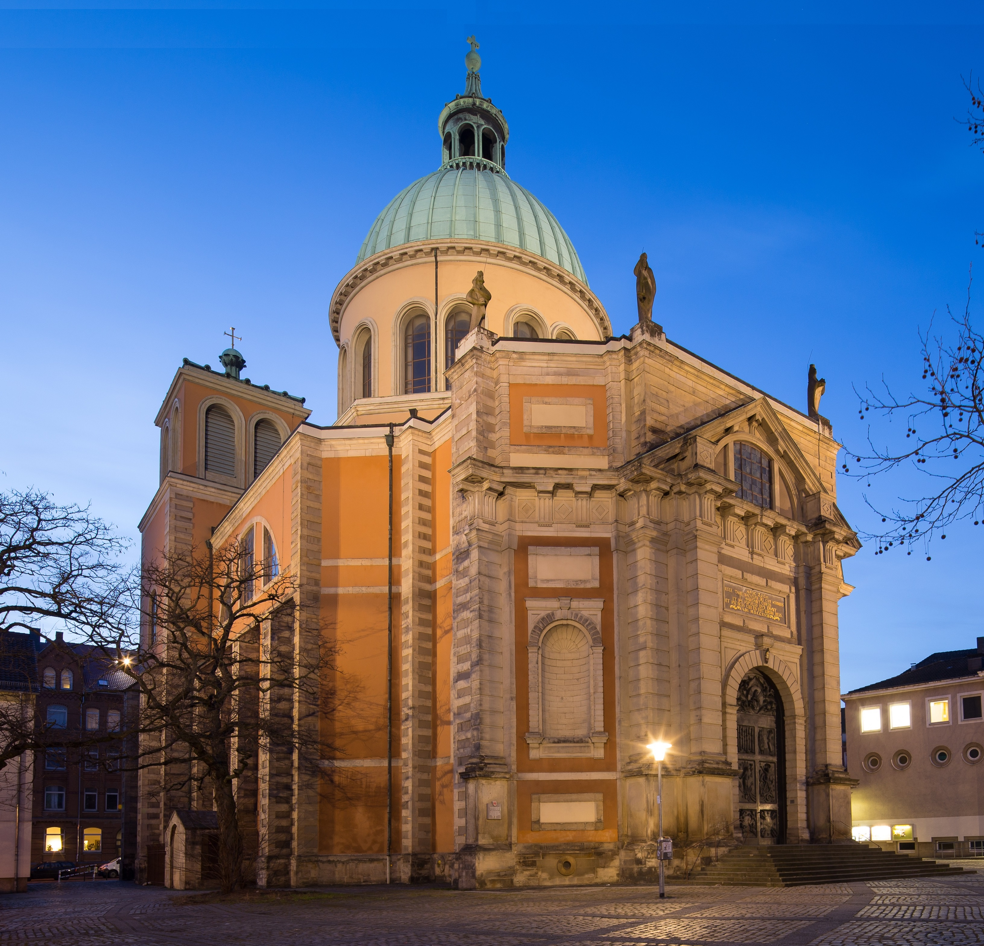 Hannover, Basilika St. Clemens, katholische Propsteikirche